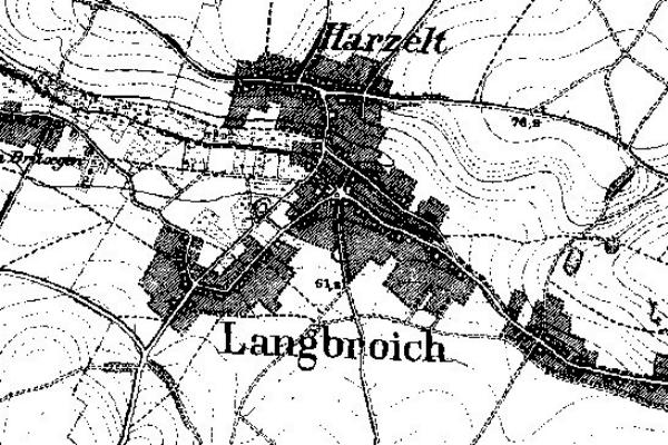 Neuaufnahme 1891-1912